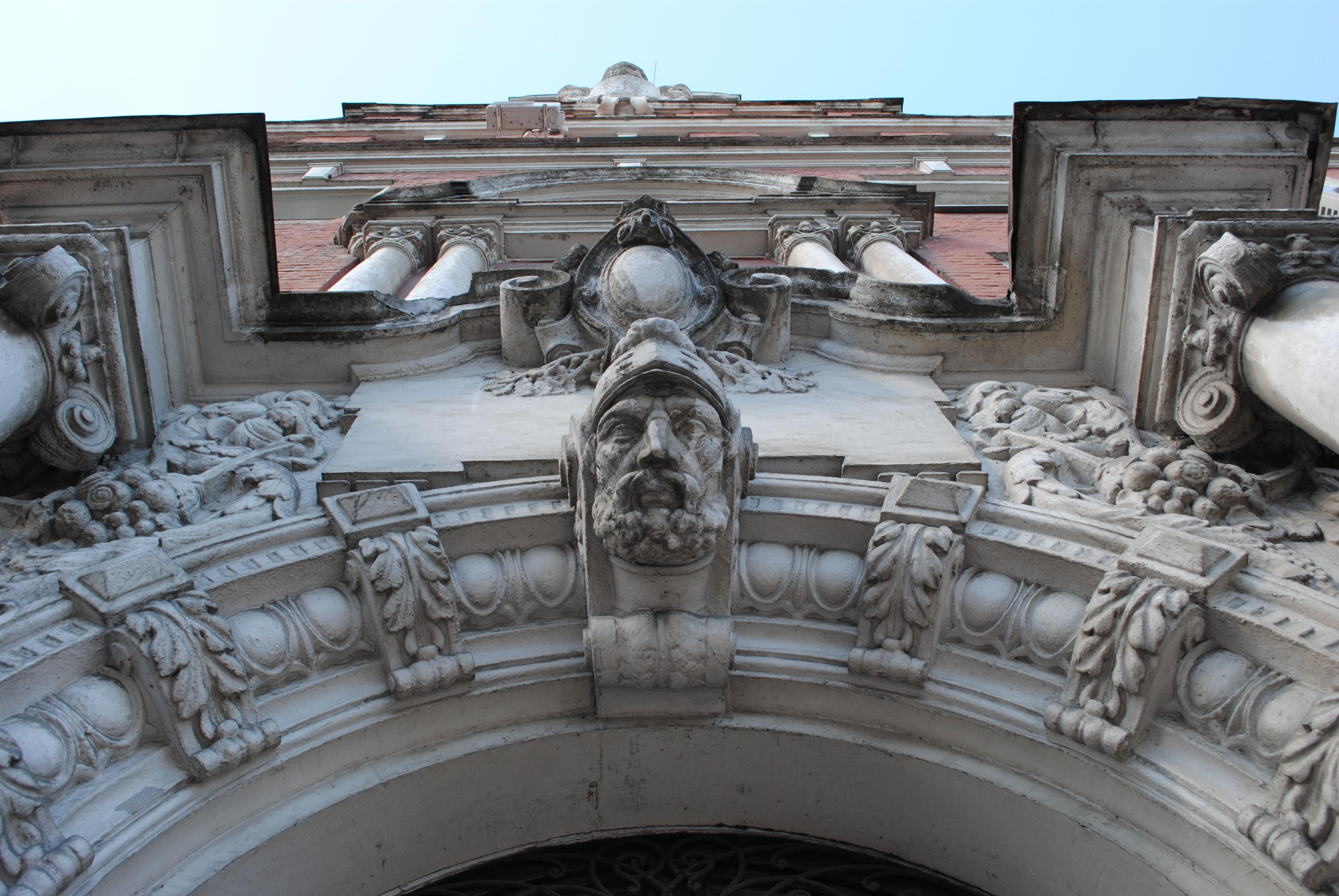 Здание полицайпрезидиума с рельефами на портале главного входа (Калиниградская область, Калининград, советский пр., 3-5)